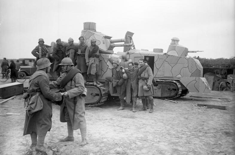 Der Krieg an der Westfront im Tonfilm! In Petersdorf in Frankfurt a/O. wird zurzeit ein grosser Kriegsfilm von der Westfront 1918 unter Mitwirkung ehemaliger deutscher und französischer Frontsoldaten aufgenommen. Das Aufnahmegelände für den Kriegsfilm umfaßt mehrere Kilometer. Die Schützengräben und Unterstände sind getreu den Vorbildern der Westfront nachgeahmt. Ehemalige deutsche und französische Frontsoldaten im Aufnahmegelände mit Tankwagen für den Tonfilm.